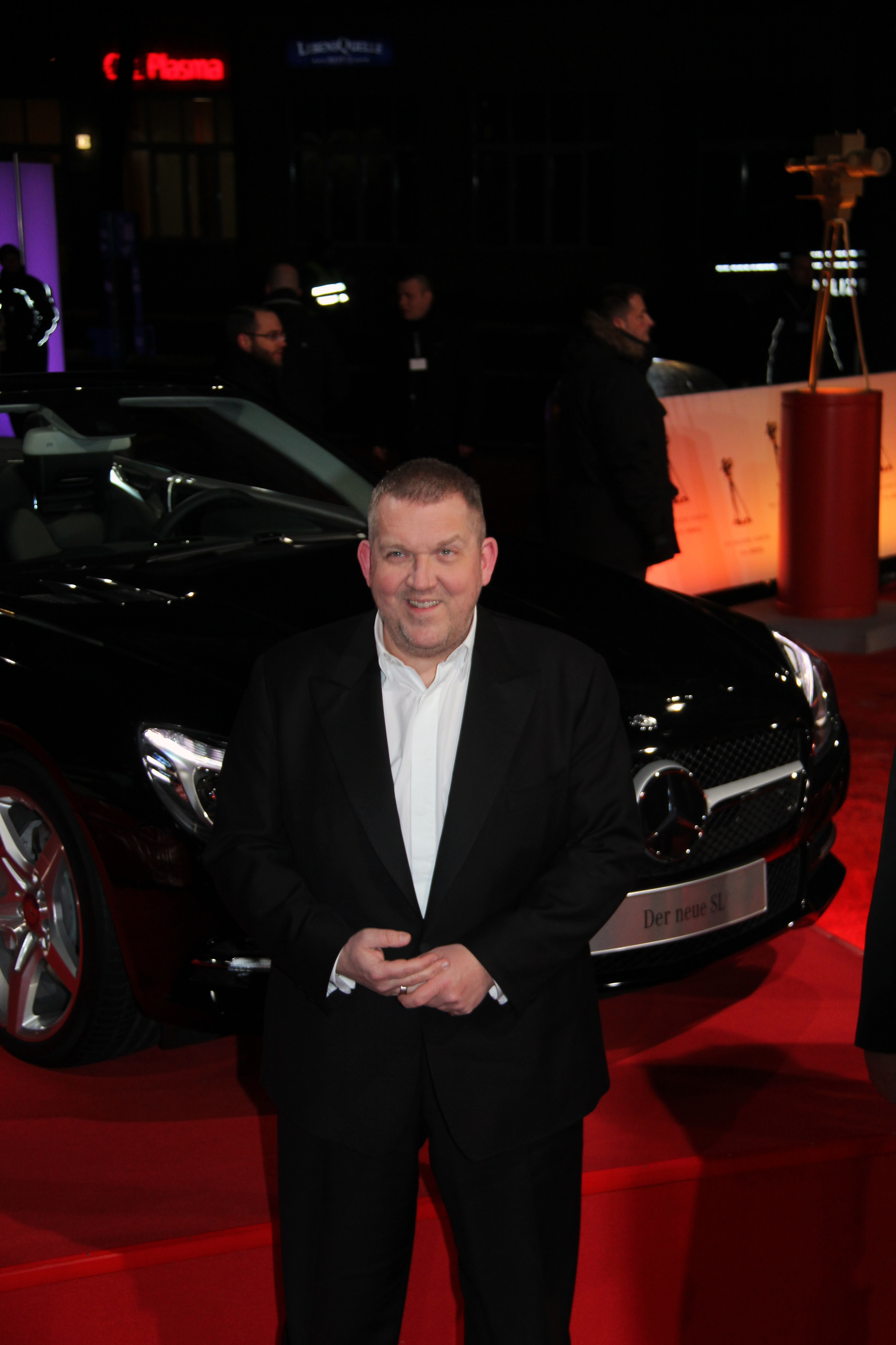 Dietmar Bär bei der Goldenen Kamera 2012